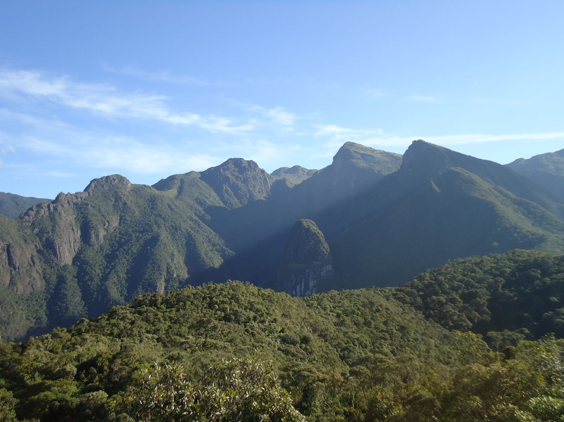 Divisor de Águas